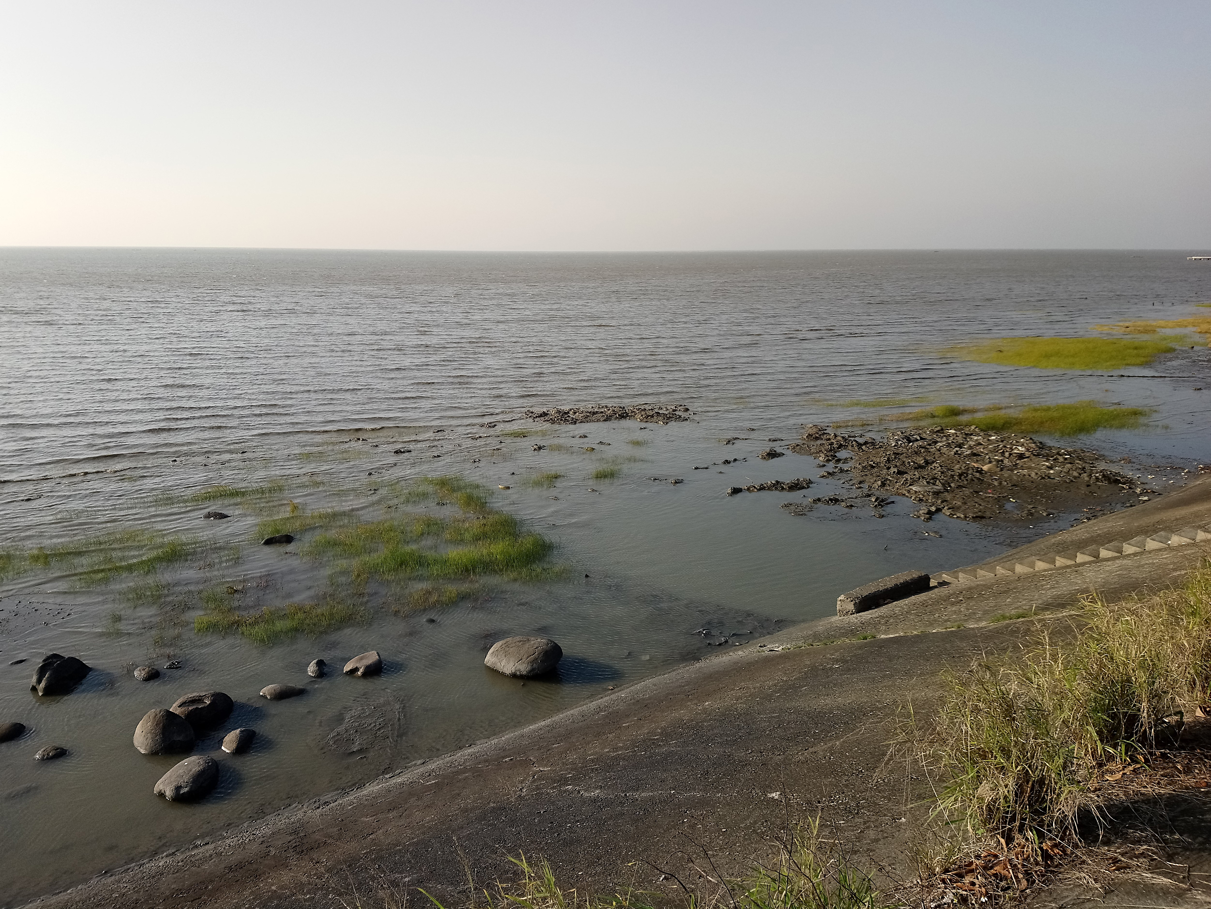 香山濕地內的雲林莞草(Bolboschoenus planiculmis),台灣省新竹市香山區香山聯里美山里